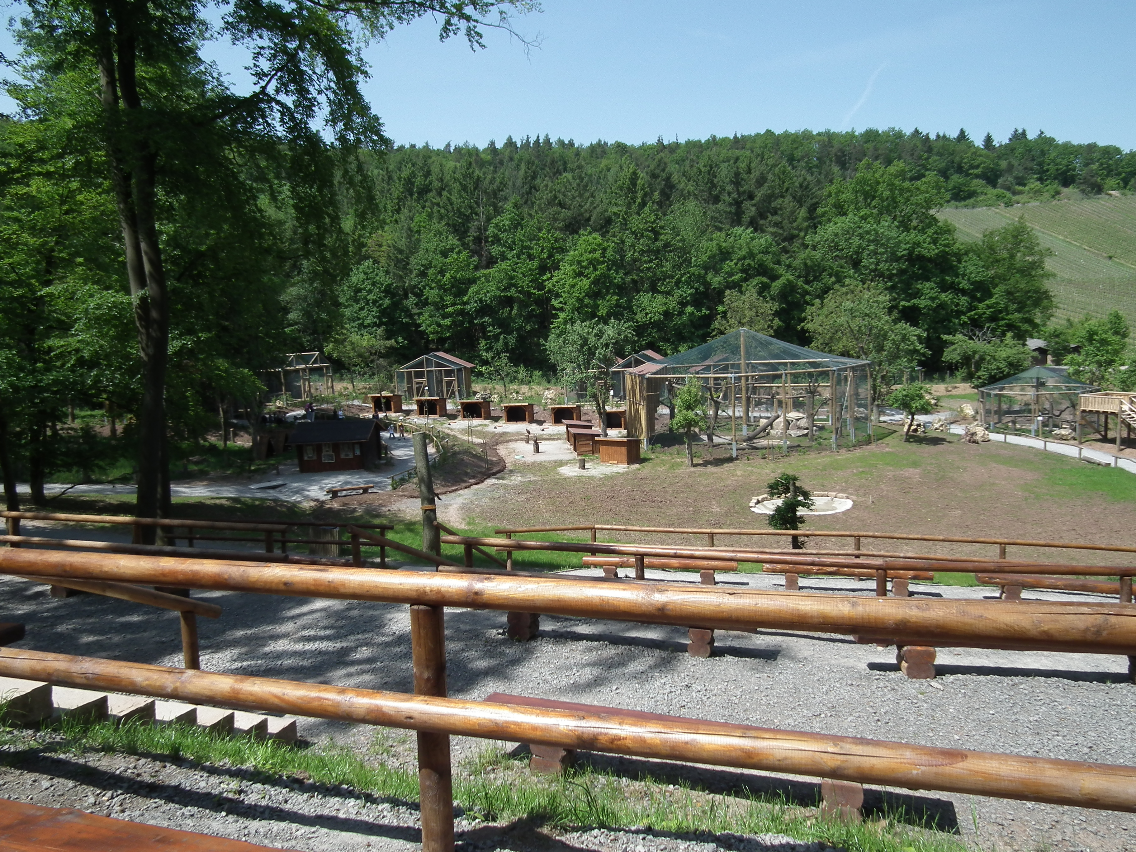 Greifvogelanlage im Wildpark Tripsdrill (Baden-Württemberg, Deutschland)